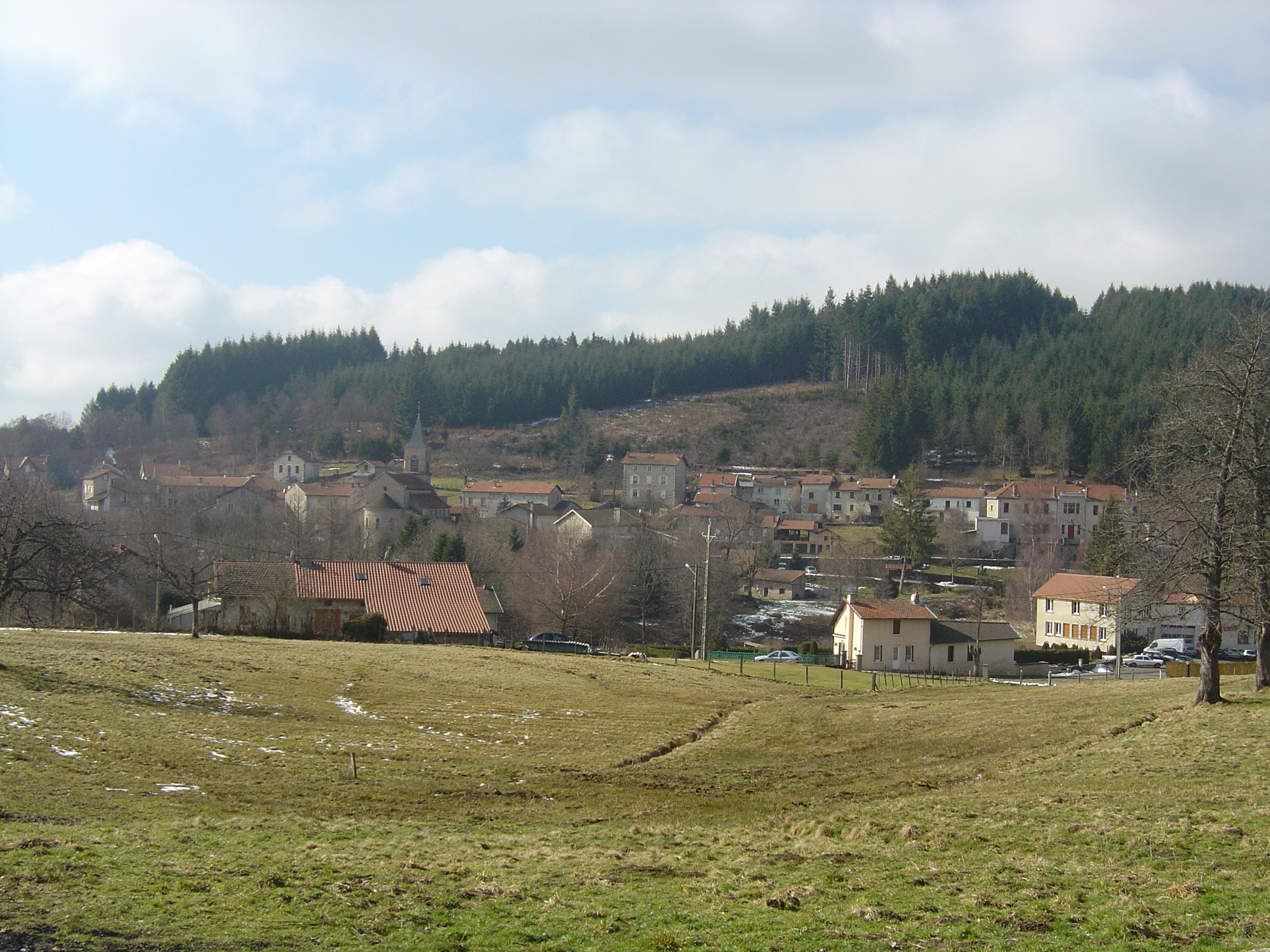 Village de Vollore-Montagne